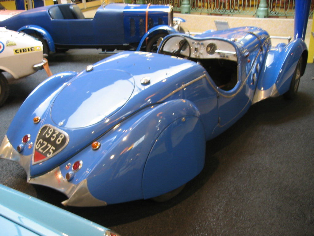 Peugeot 302 Darl'mat - Musée Peugeot Sochaux